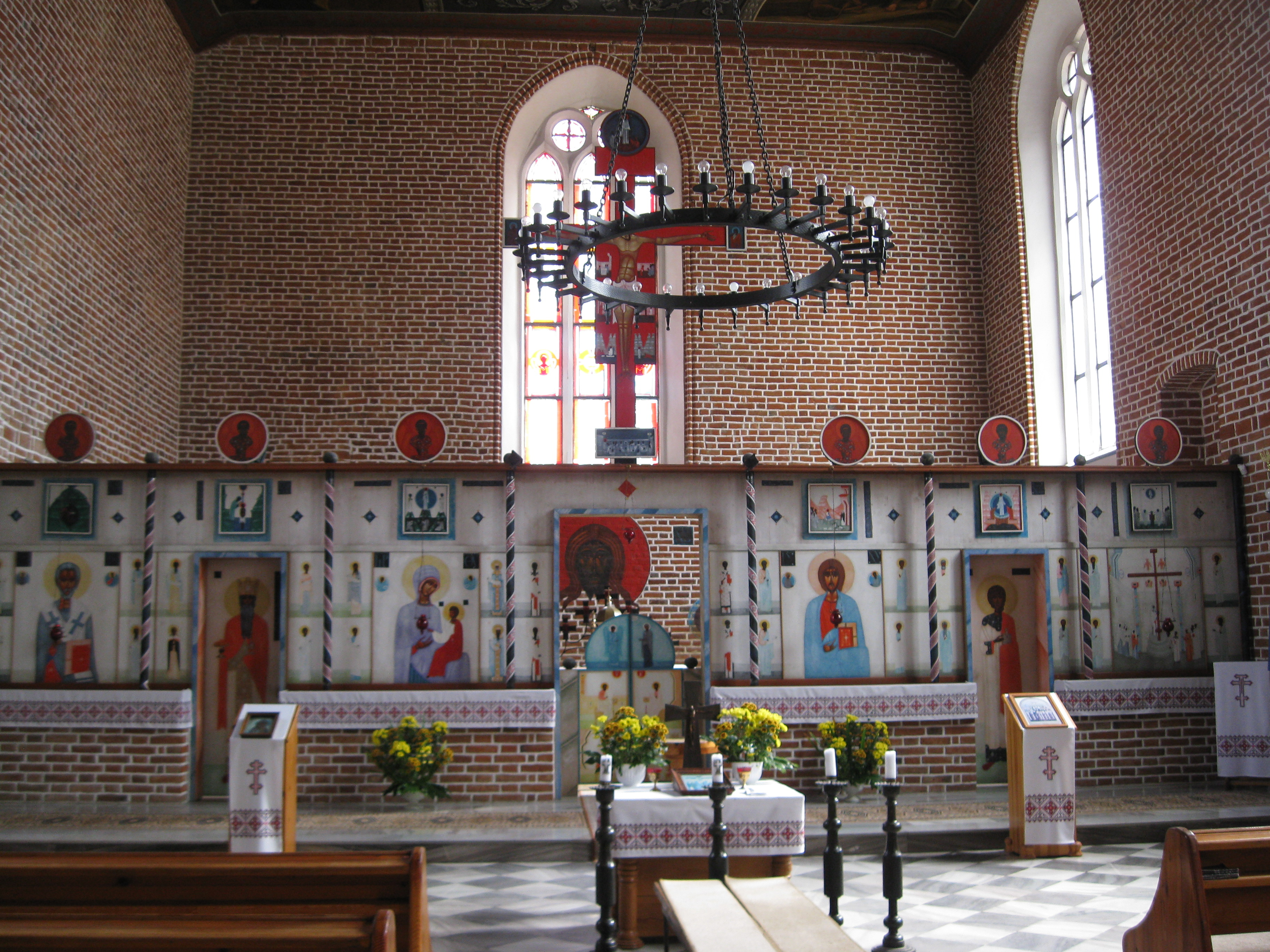 Górowo Iławeckie, ul. Warmińska 21 - dawny kościół ewangelicki, obecnie cerkiew greckokatolicka Podwyższenia Krzyża Świętego (zabytek nr A-215 i 257 (G/28) z 15.03.1957)